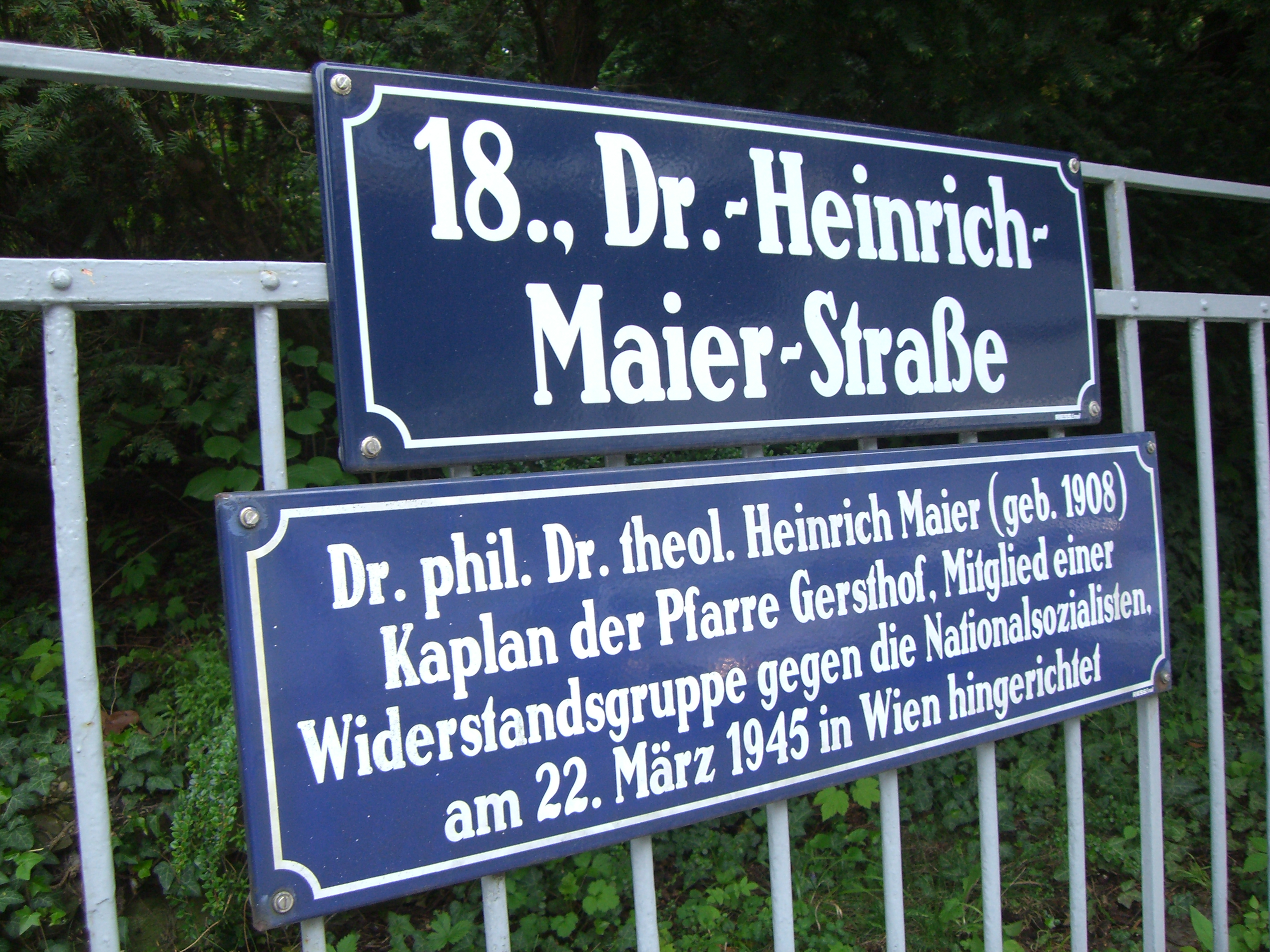 Dr. Heinrich Maier-Straße, Währing, 1180 Wien